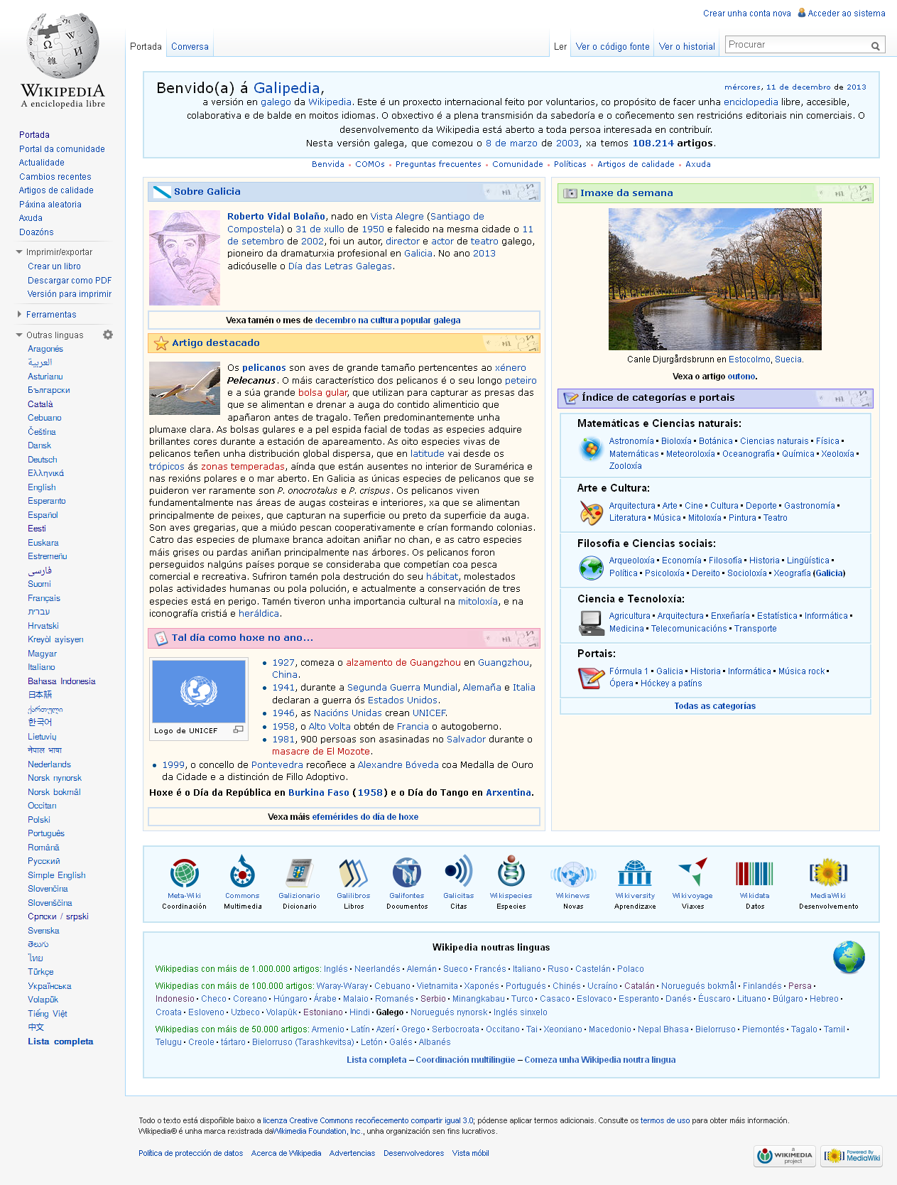 Screenshot - Hlavní strana galicijské Wikipedie ze dne 11. prosince 2013